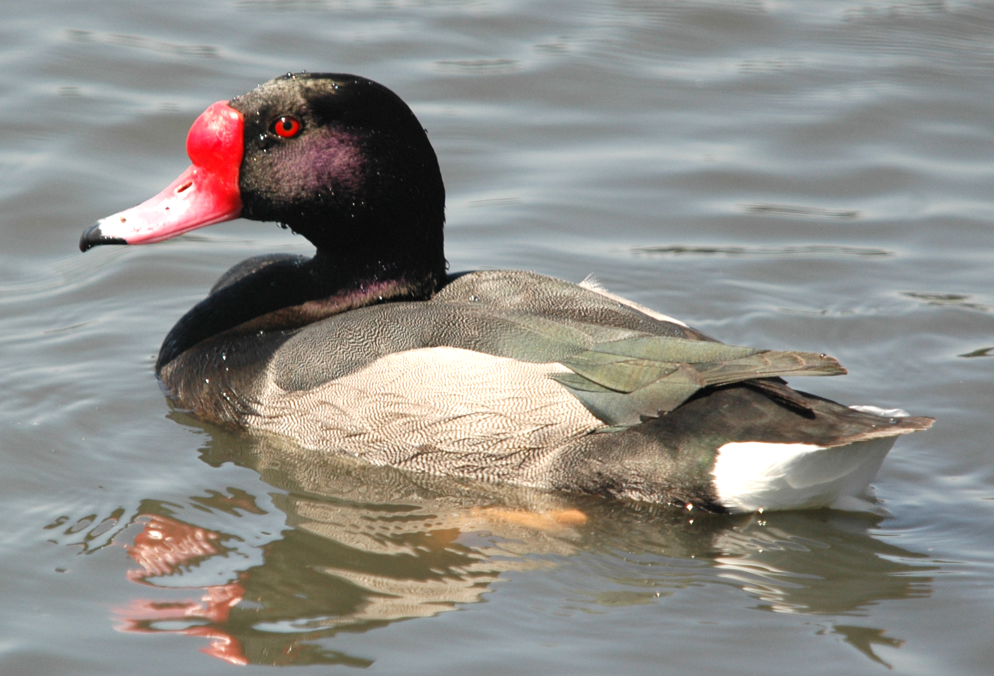 Netta peposaca male, Costanera Sur Ecological Reserve, Buenos Aires.